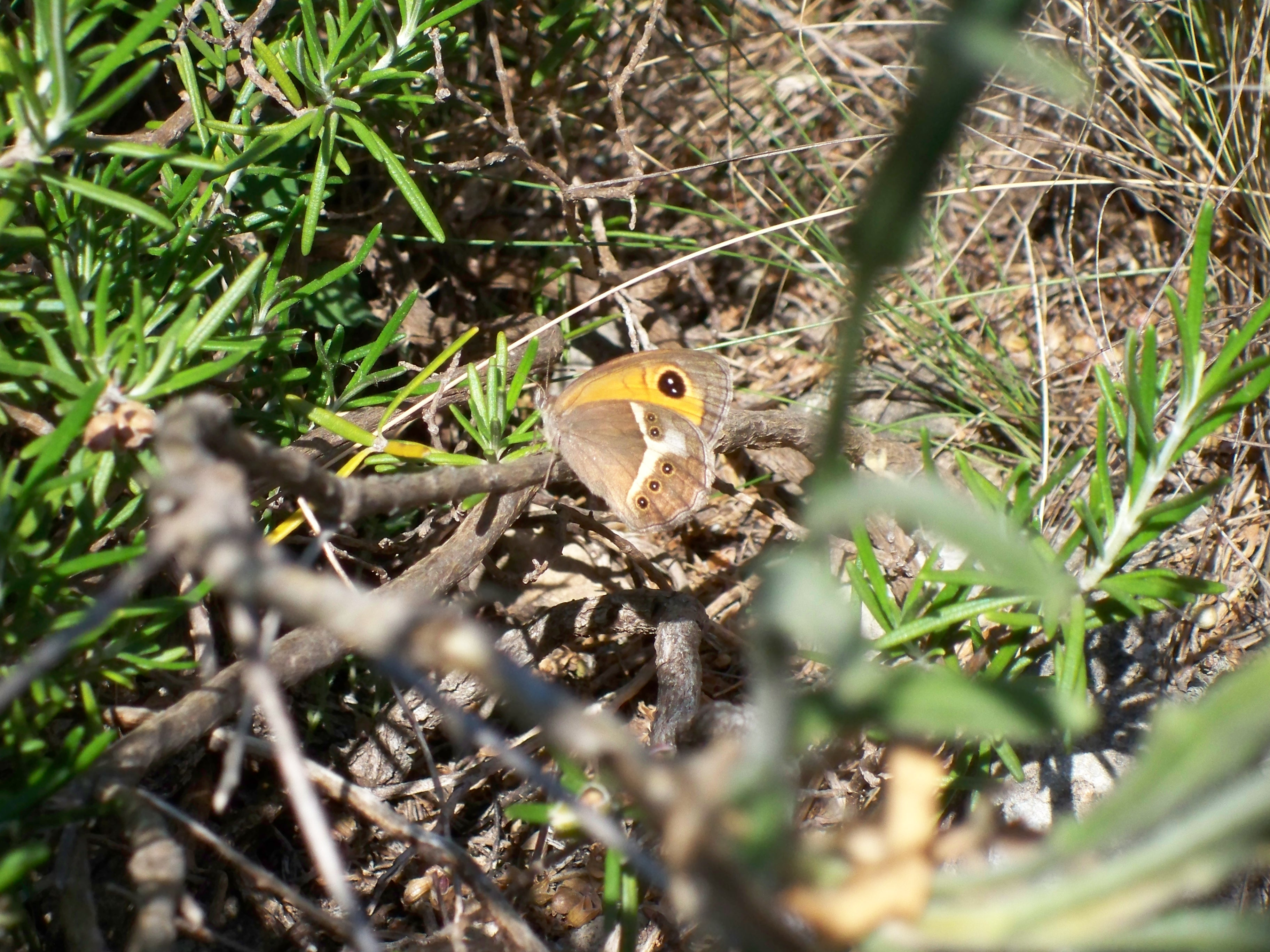 Mariposa cerca del pueblo de Molinicos (Albacete)